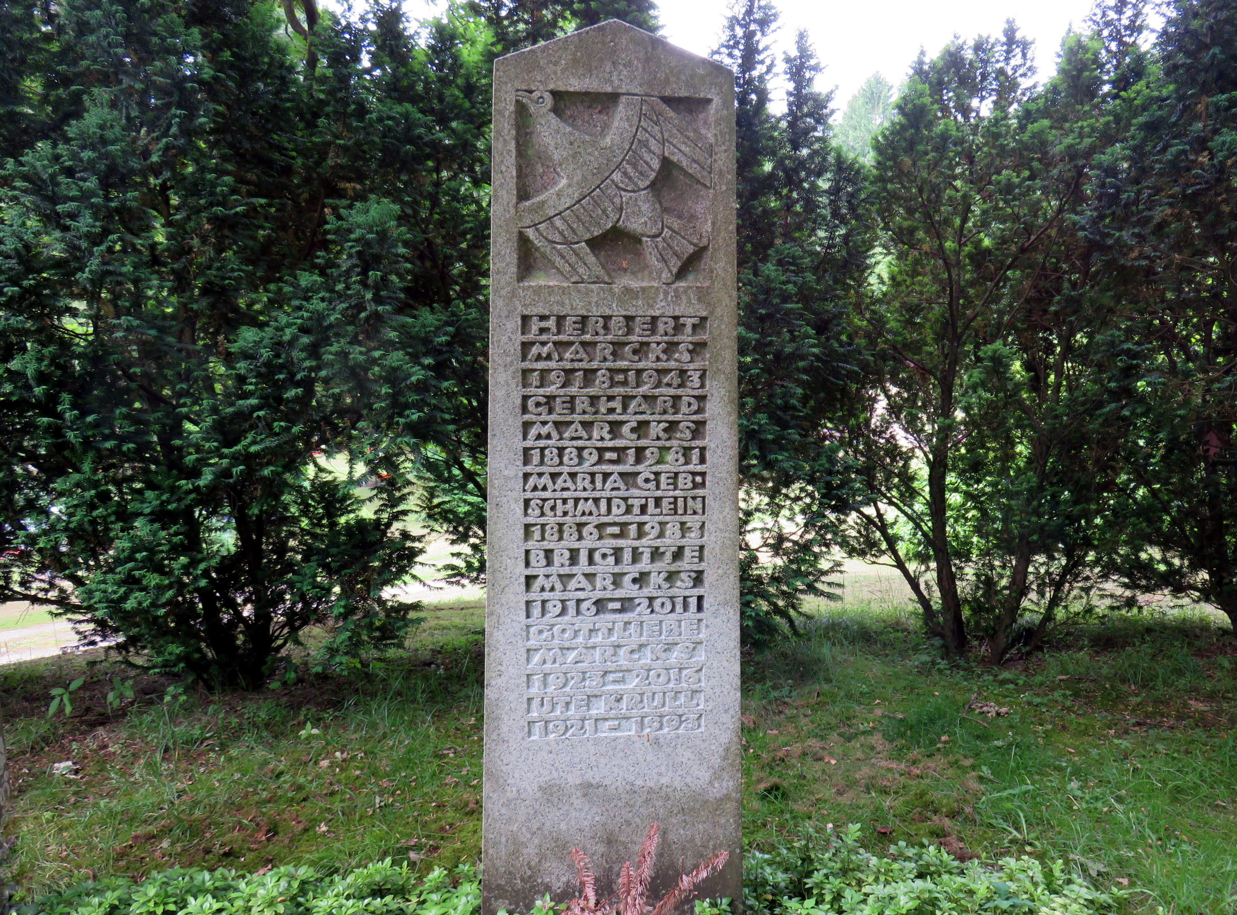 Grabstein für den deutschen Bildhauer Gerhard Marcks auf dem Ohlsdorfer Friedhof auf einem Hügel nahe Nordteich (Planquadrat AD 15).